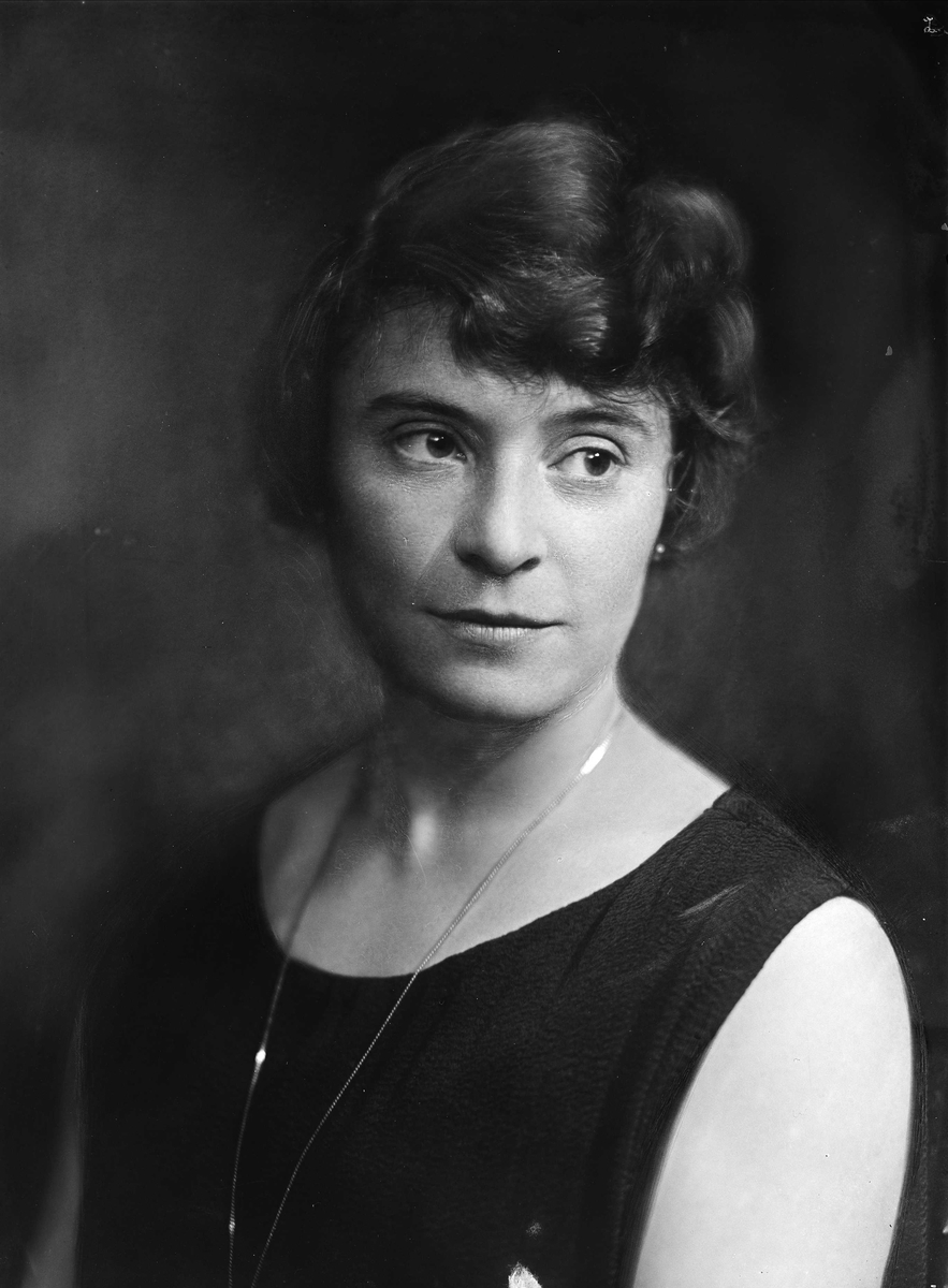 Gerda Ring, fotografert 1924